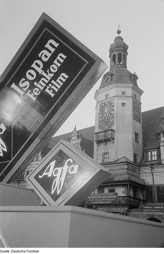 Original image description from the Deutsche FotothekWerbung der Wolfener Agfa für Isopan Feinkorn-Film, im Hintergrund das Alte Rathaus